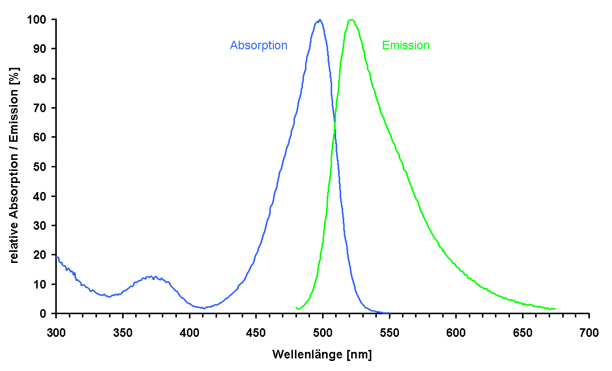 Absorptions- und Emissionsspektrum von SYBR Green I gebunden an dsDNA.